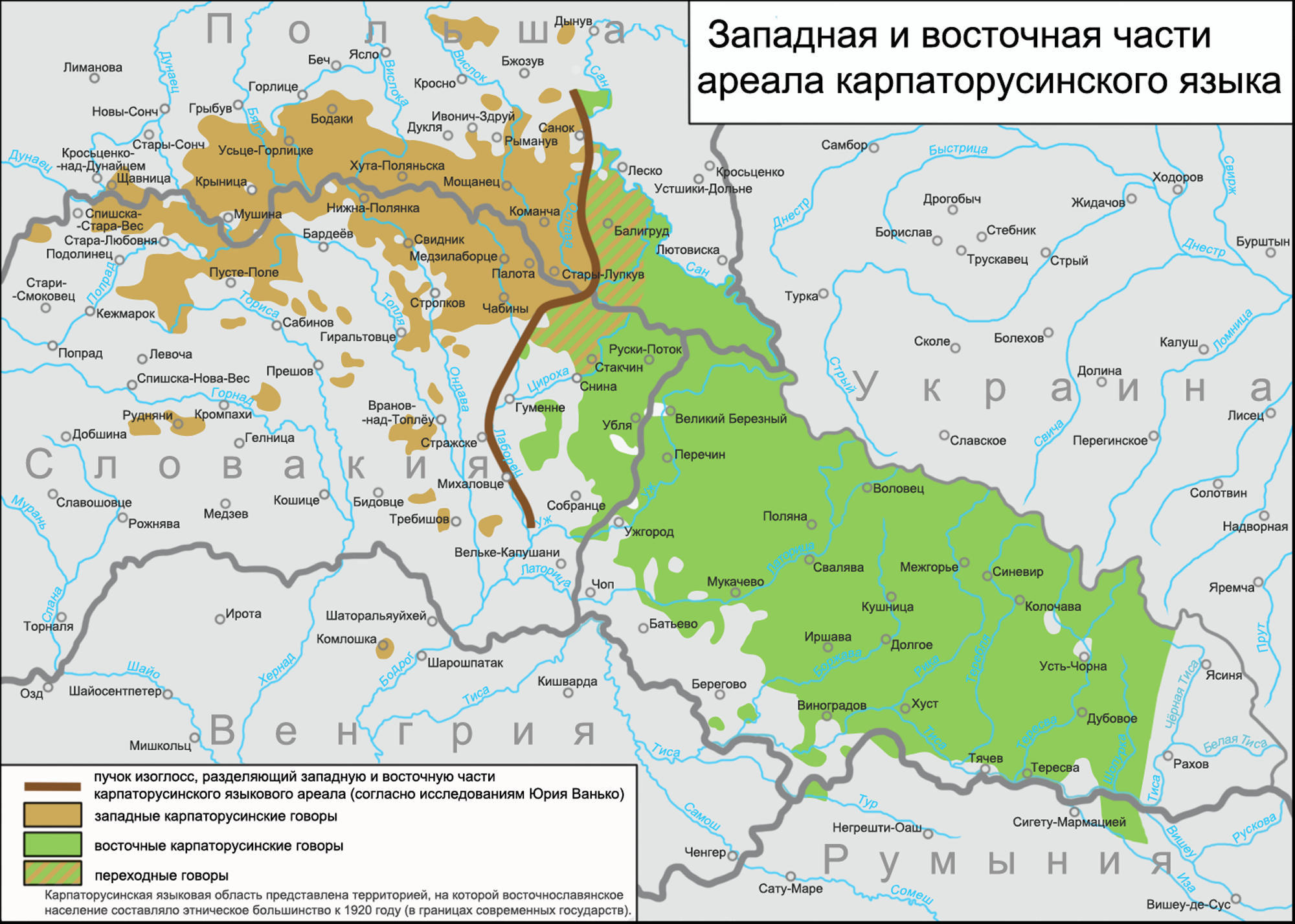 Карта разделения карпаторусинского ареала на западную и восточную части согласно исследованиям Юрия Ванько. На основе данных: Ванько Ю. Русиньскый язык. Карпатьскы русиньскы діалекты. Класіфікація карпатьскых русиньскых діалектів (русин.). Пряшів: Академія русиньской културы в Словеньскій републіцї; Маґочiй П. Р. Map of Dialects of Karpathian Rus’.